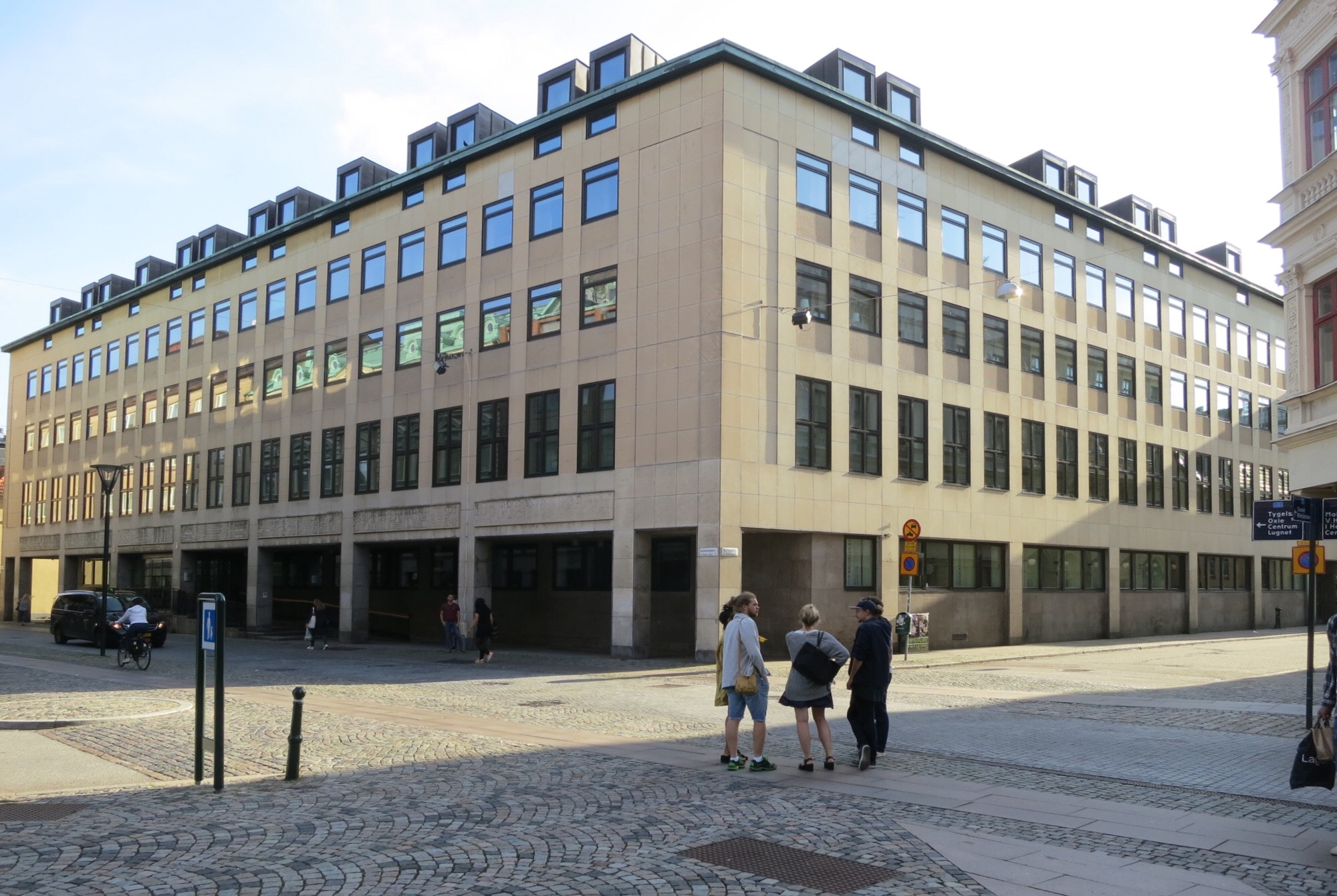 Malmö tingsrätt